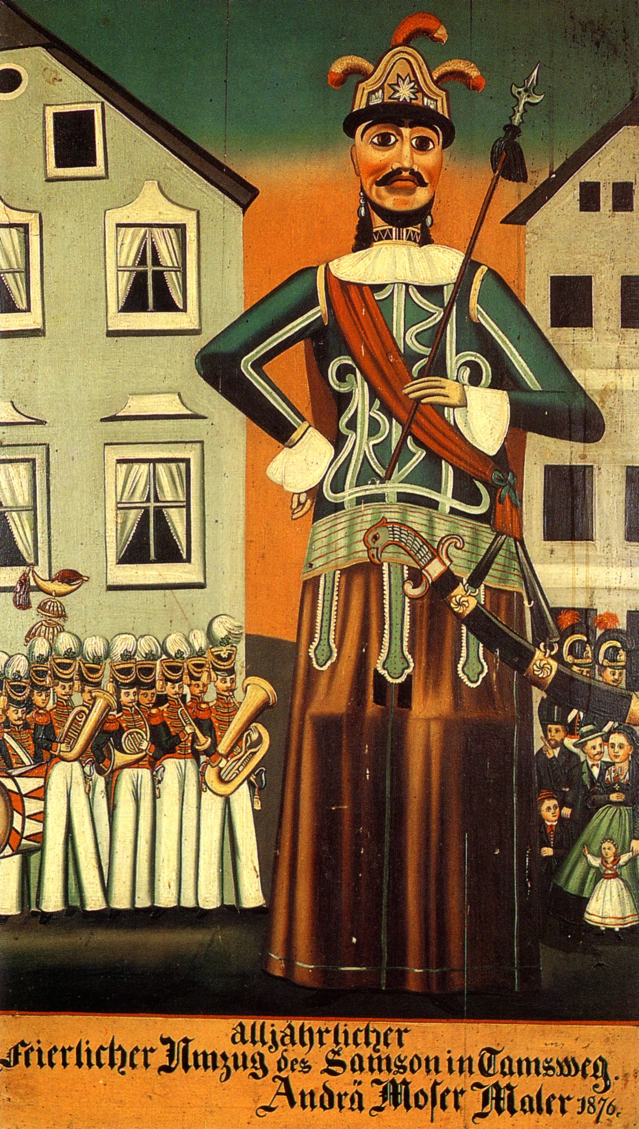 Historischer Samsonumzug in Tamsweg